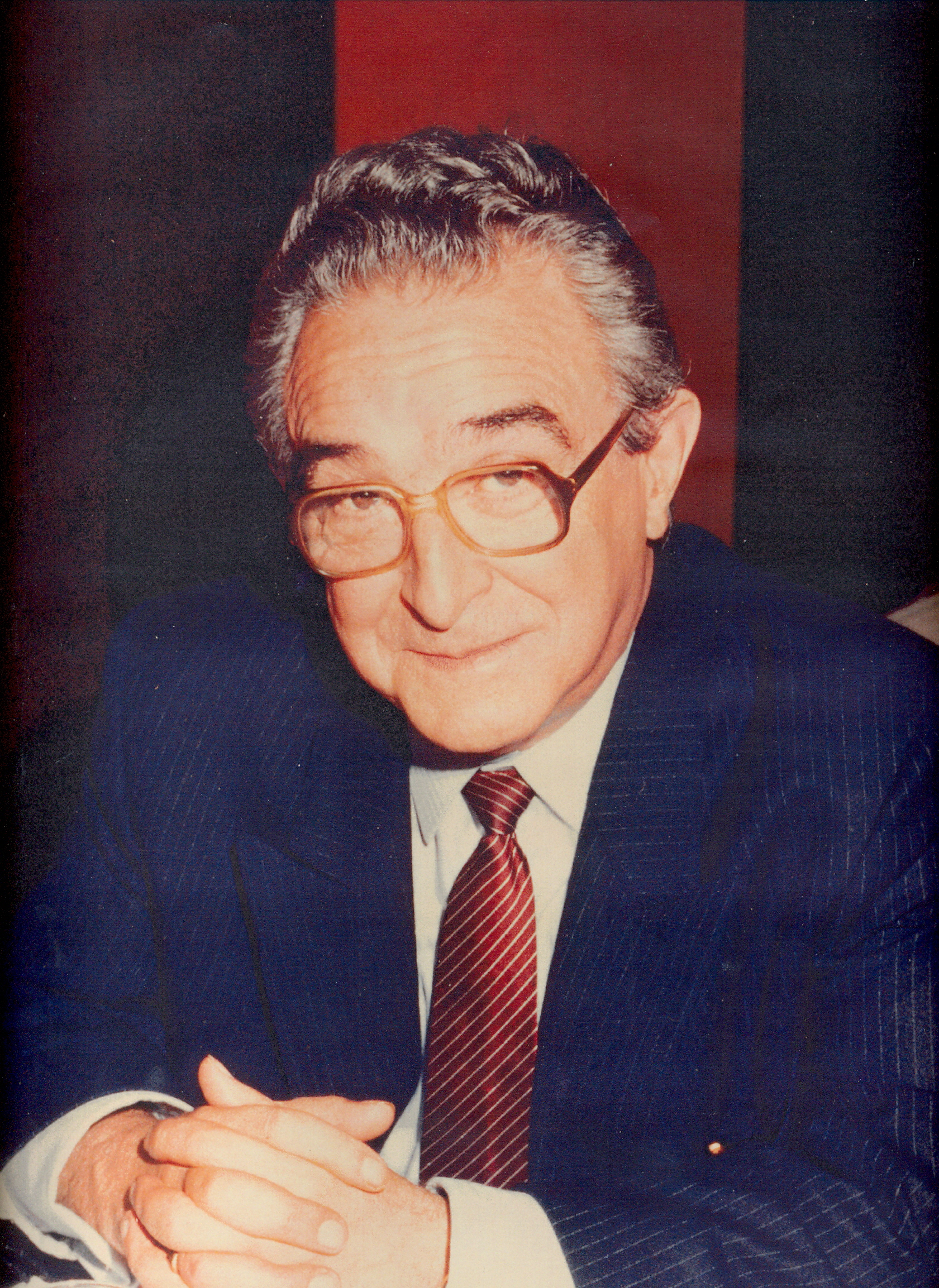 Photo de Monsieur Jean Ruer (1925-1987), professeur à l'Université Charles-de-Gaulle Lille 3.